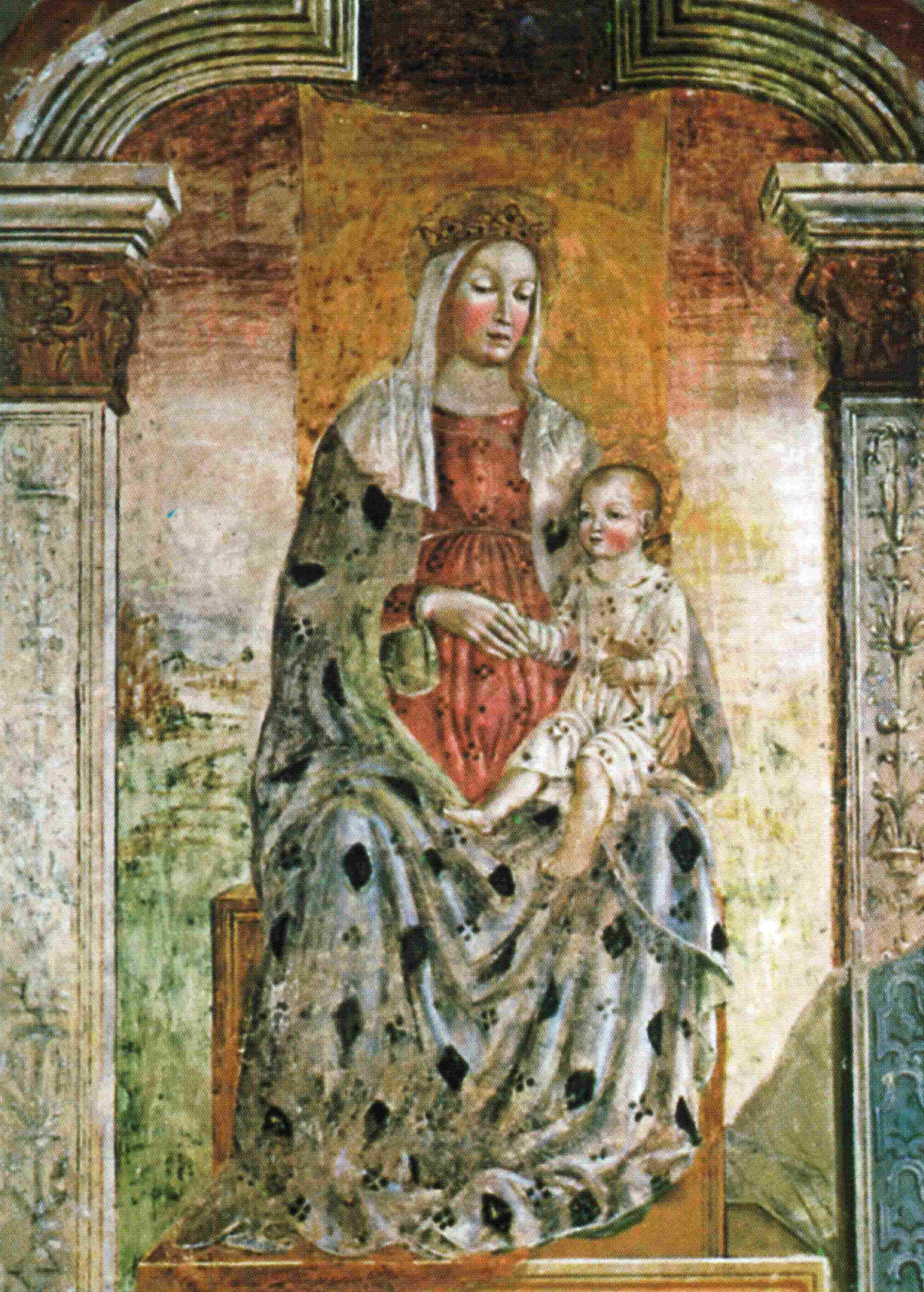 Madonna col Bambino, affresco di Francesco Tacconi nella Badia di Santa Maria della Neve (Torrechiara).